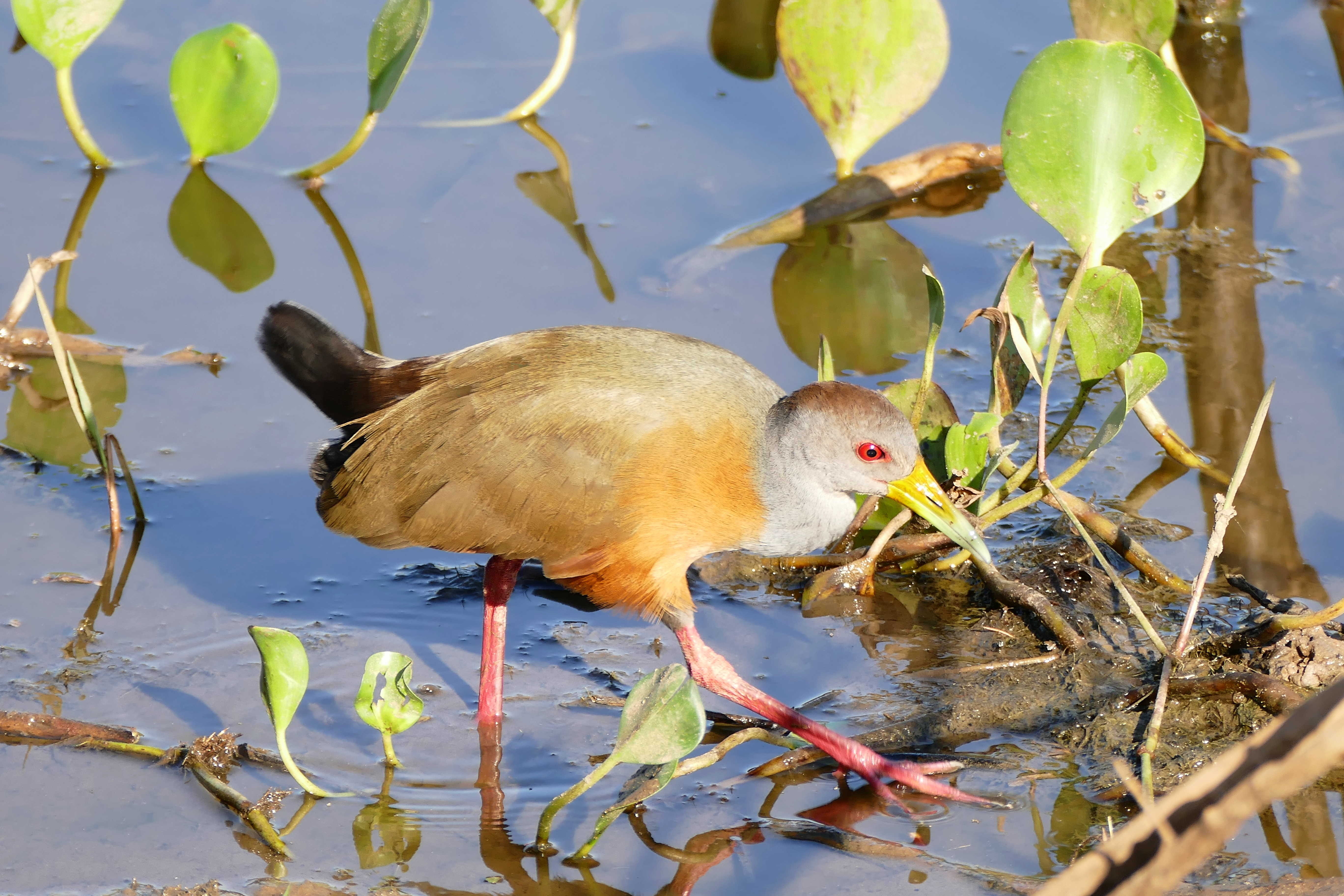 Transpantaneira, Poconé, Mato Grosso, BRAZIL